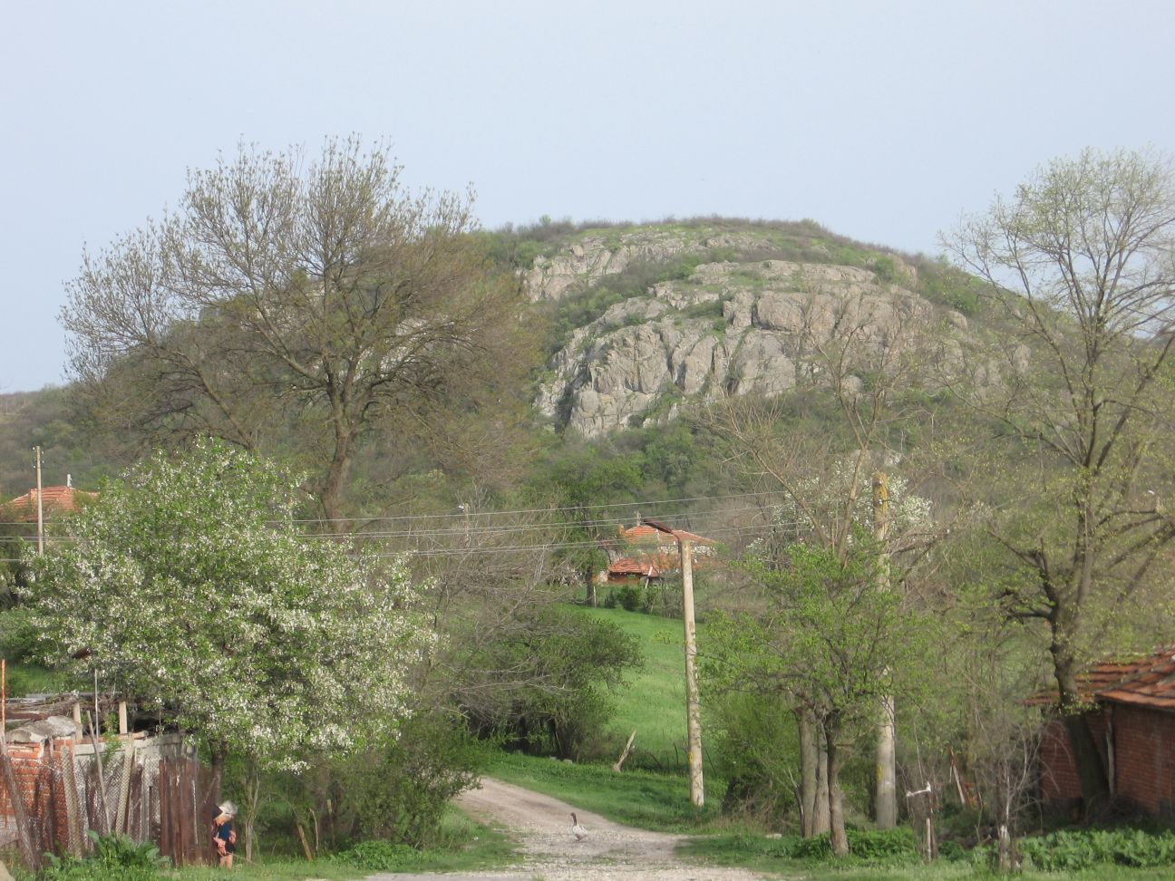 == Лицензиране: ==